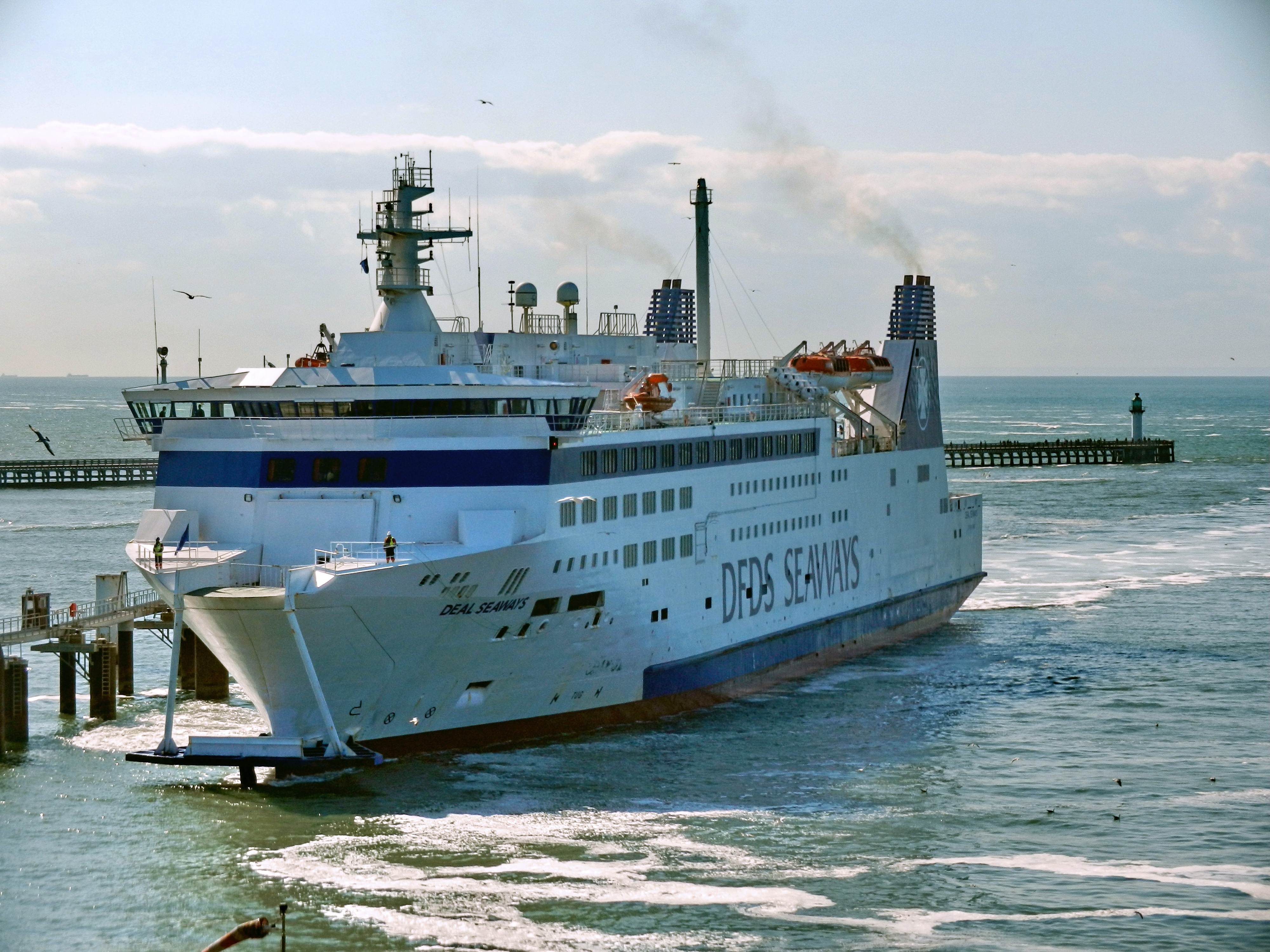 Calais